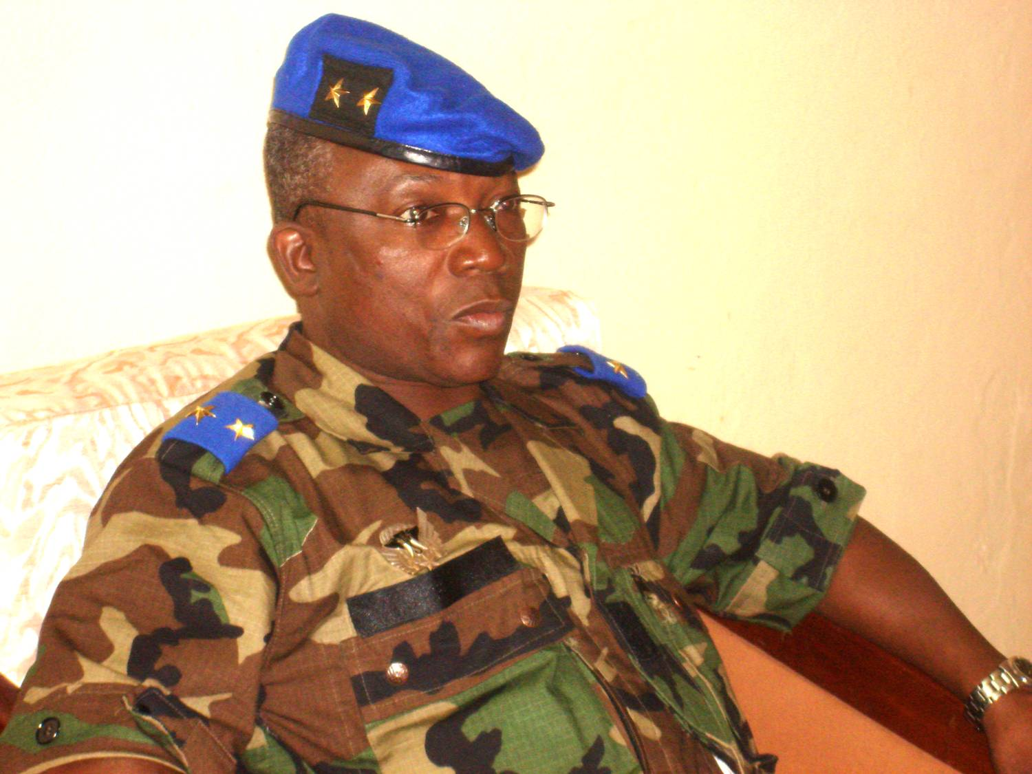 Soumaila Bakayoko, Chef d'Etat-major des Forces armées des forces nouvelles de Côte d'Ivoire